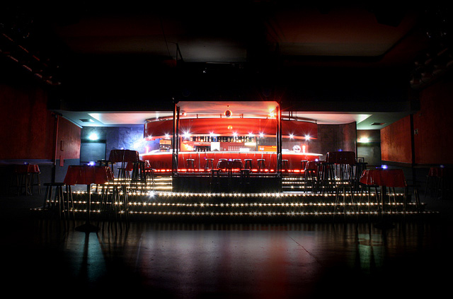 Das Gloria-Theater in Köln, Ansicht des hinteren Saals mit Bar